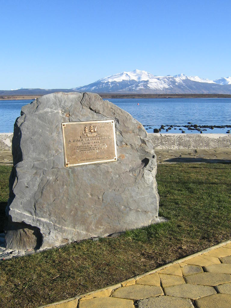 Placa recordatoria a Don Juan Ladrillero, costanera de Puerto Natales